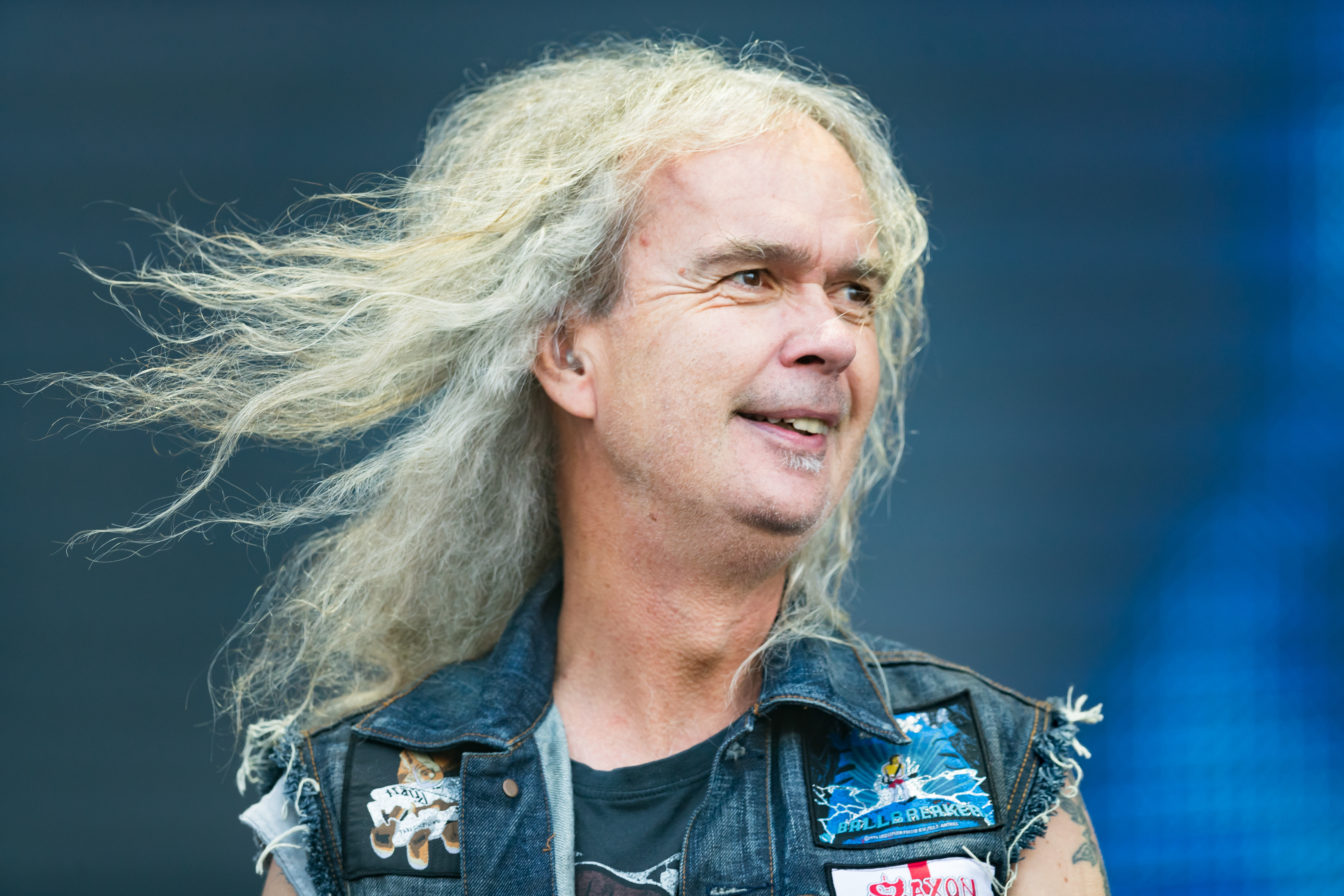 Grave Digger during Wacken Open Air at Schleswig-Holstein, Wacken, , Germany on 2017-08-04, Photo: Sven Mandel